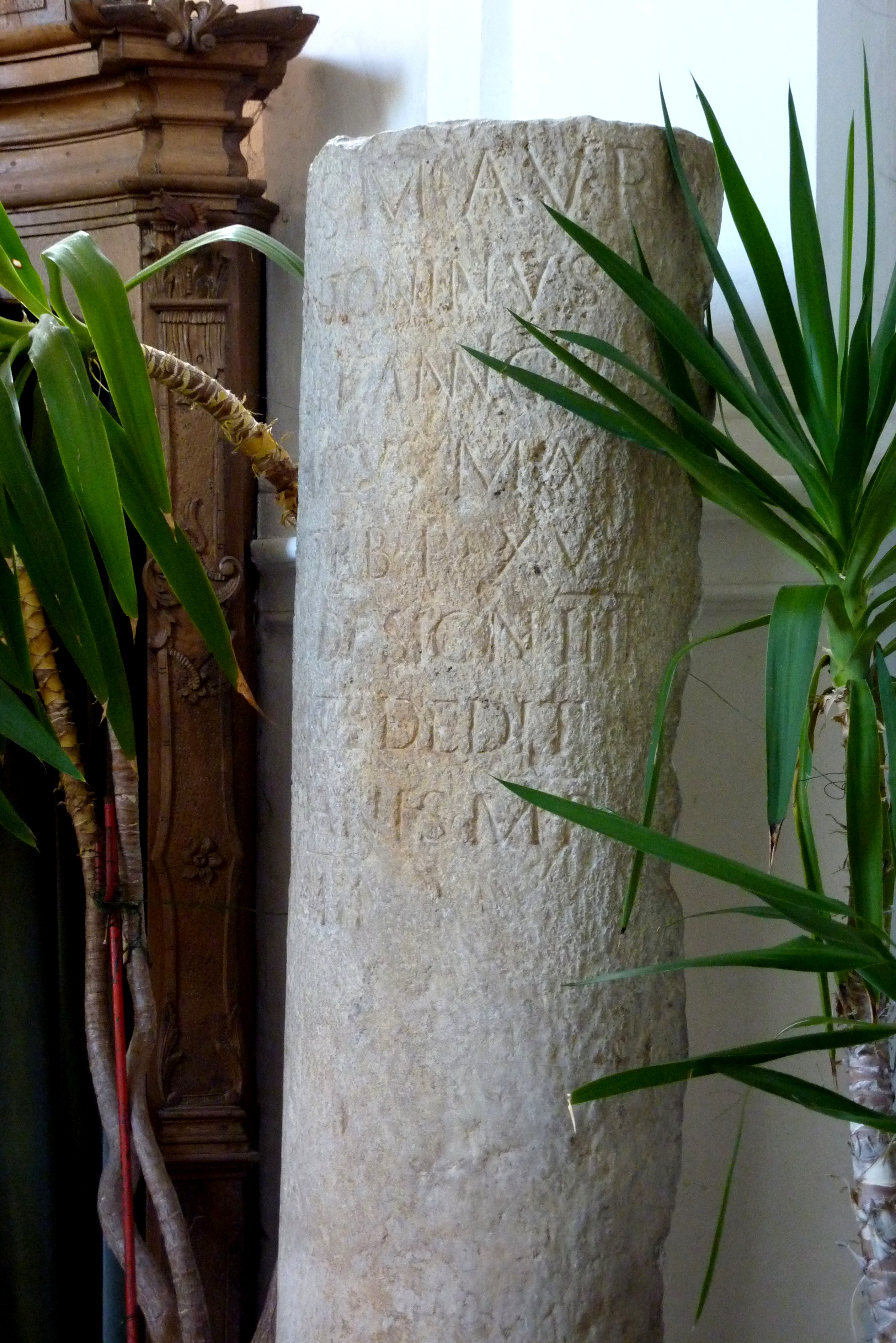 katholische Stadtpfarrkirche St. Martin in Gundelfingen an der Donau, römischer Meilenstein in der Leonhardskapelle aus dem Jahr 212